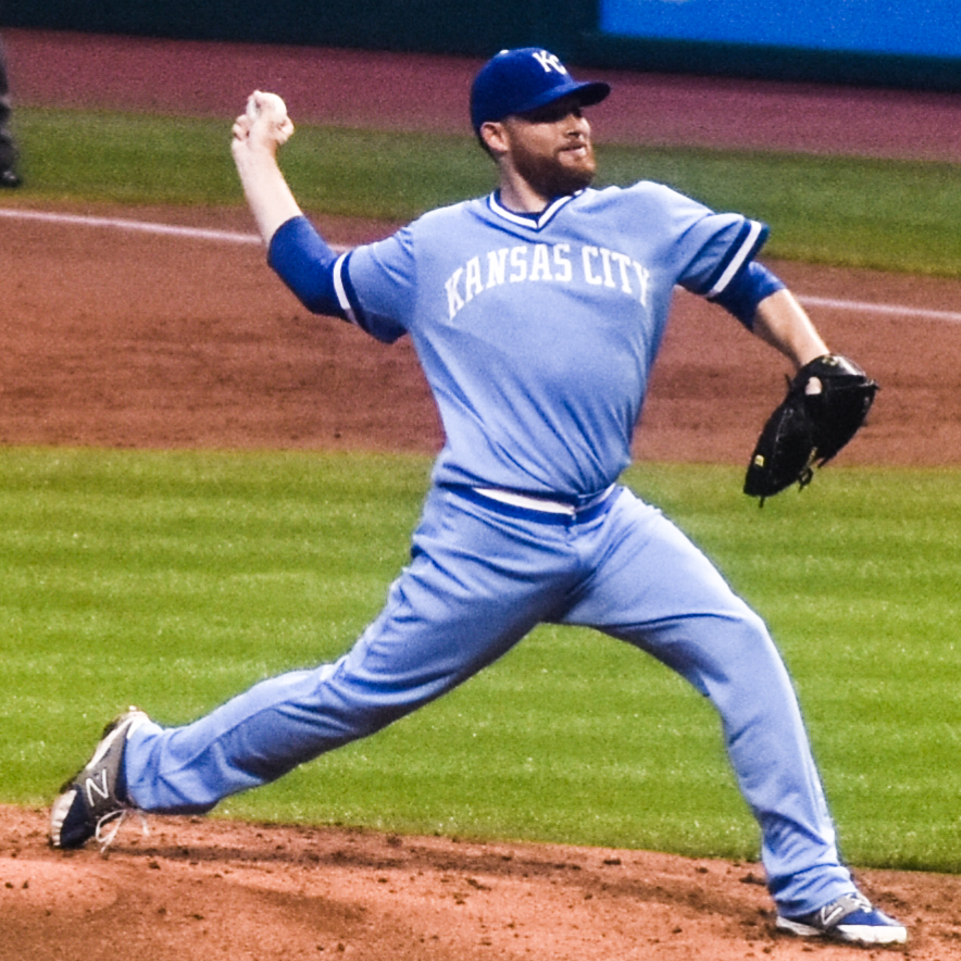 Ian Kennedy